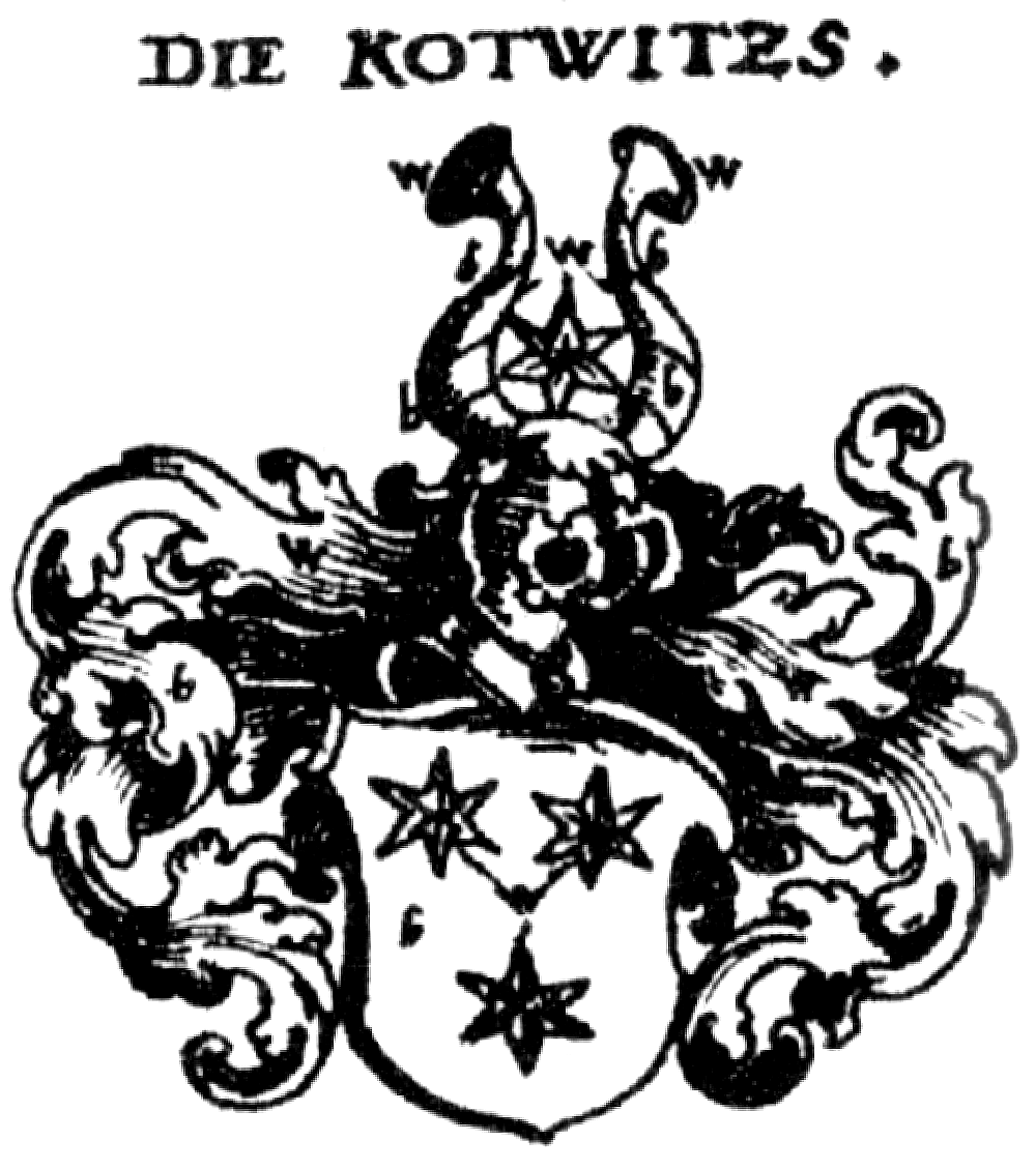 Wappen derer von Kotwitzs